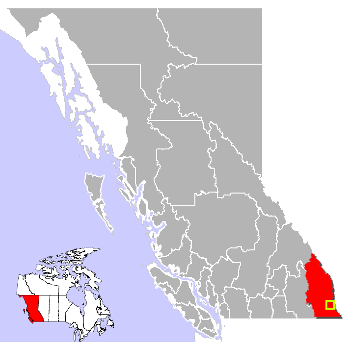 Fernie, location.